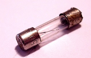 osigurač